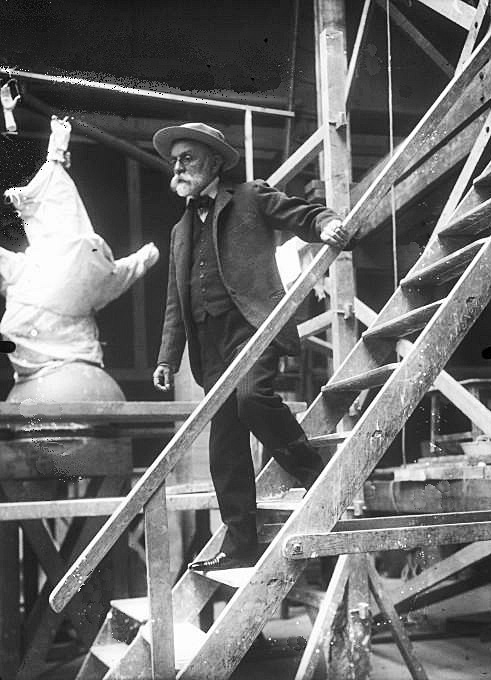 René de Saint-Marceaux, statuaire dans son atelier : photographie de presse